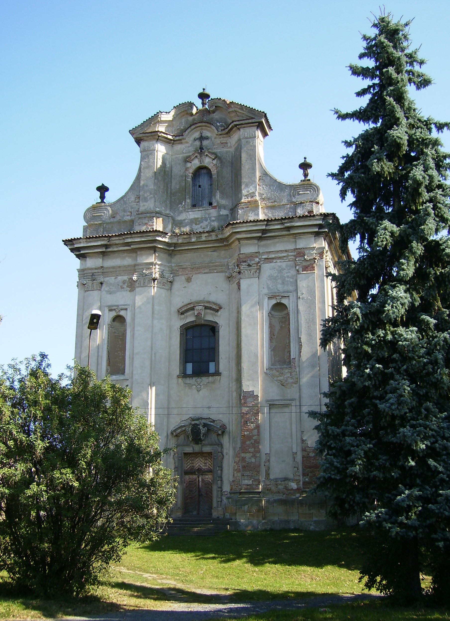 Kostel sv. Havla ve středočeské Štolmíři (část města Český Brod v okrese Kolín).